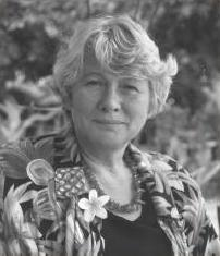 عکس خانم هلین سانسیسی-ویردنبورخ این عکس تنها در وبلاگ مربوطه آمده و از صاحب وبلاگ اجازه کسب شده در آدرس ذیل